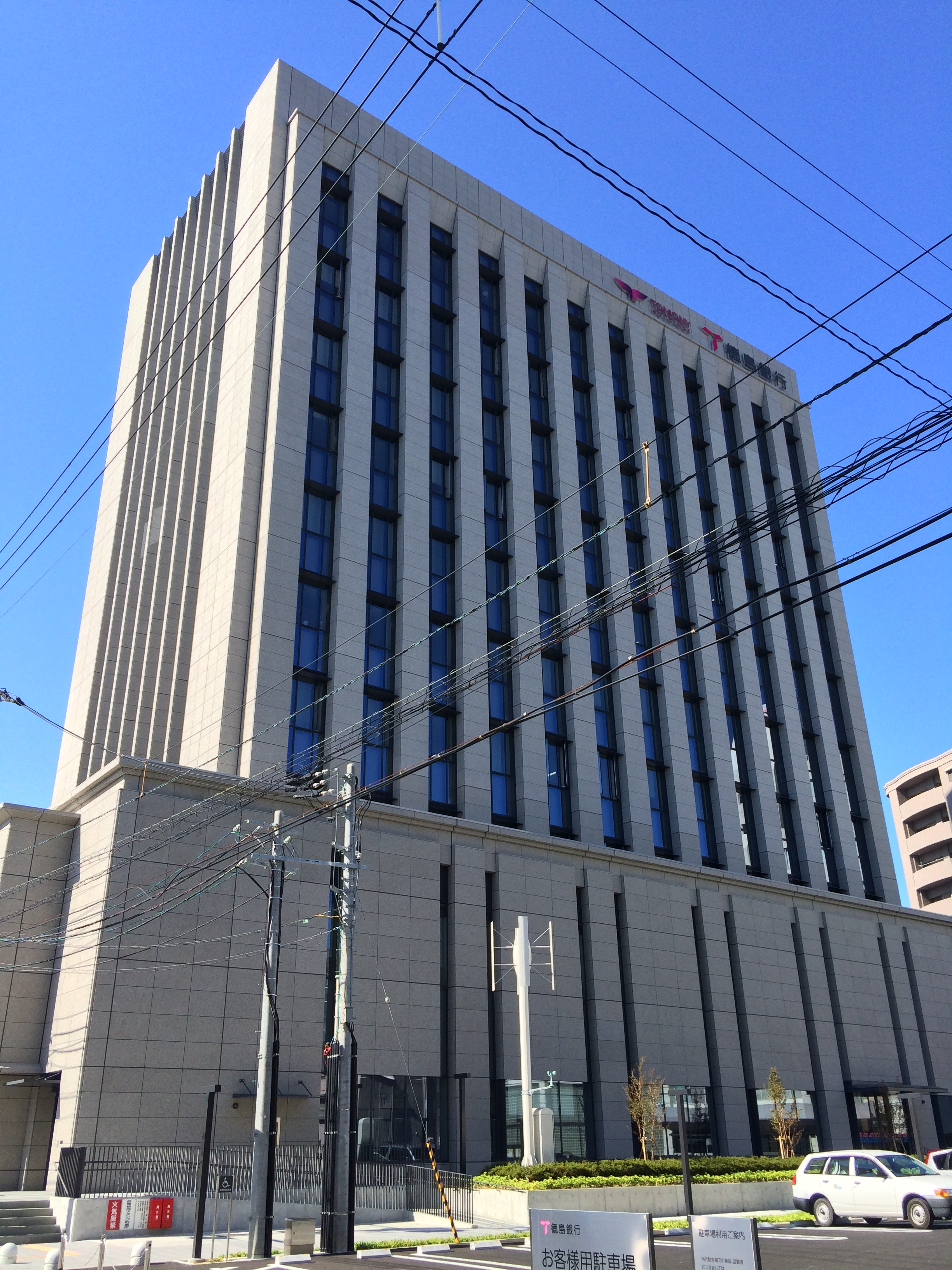 徳島県徳島市富田浜一丁目41番地にある徳島銀行本店ビル。